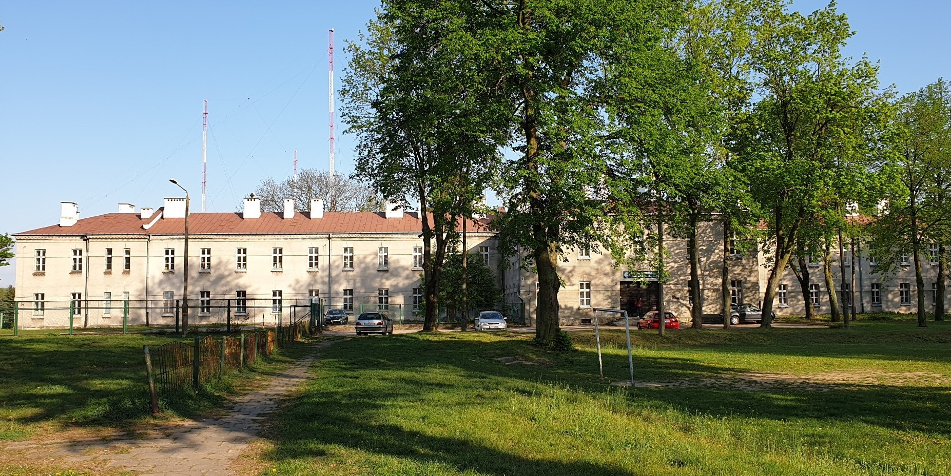 Garnizon Przasnysz, koszarowiec nr 7 (2019)